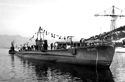 fonte: Scirè - sito marina militare italiana